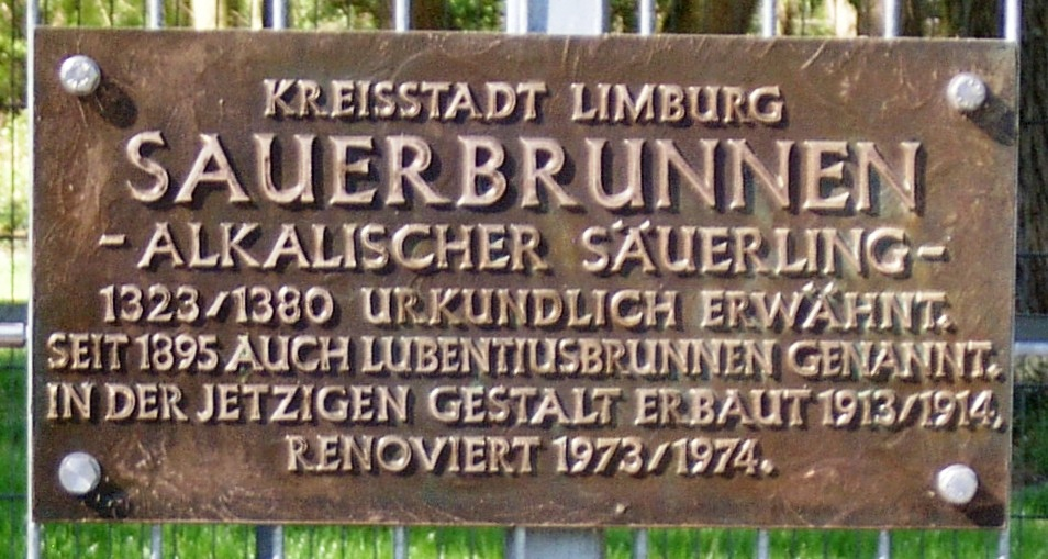 Lindenholzhausen, Germany, Nameplate on the Sauerbrunnen